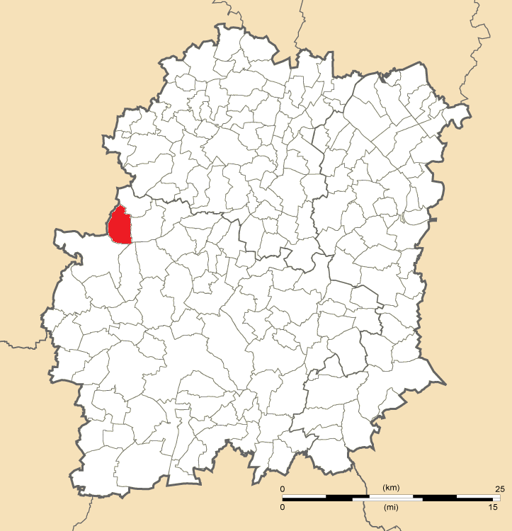 Carte de position de Saint-Cyr-sous-Dourdan en Essonne (91)